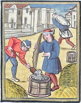 Le Mesureur de blé, d'après les Ordonnances de la prévôté des marchands de la Ville de Paris, éditées par Antoine Vérard en 1528